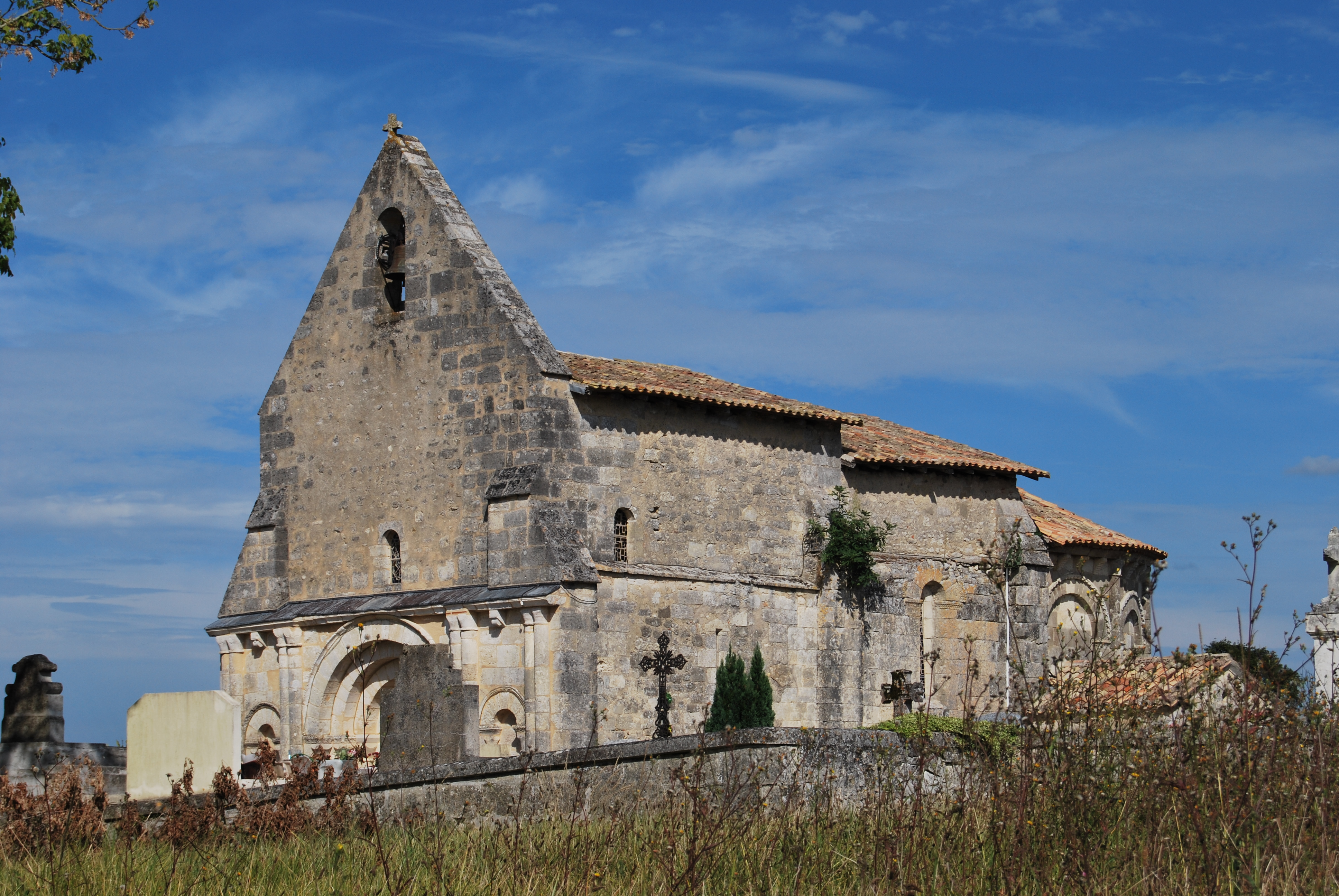 Église Saint-Pierre de Gours